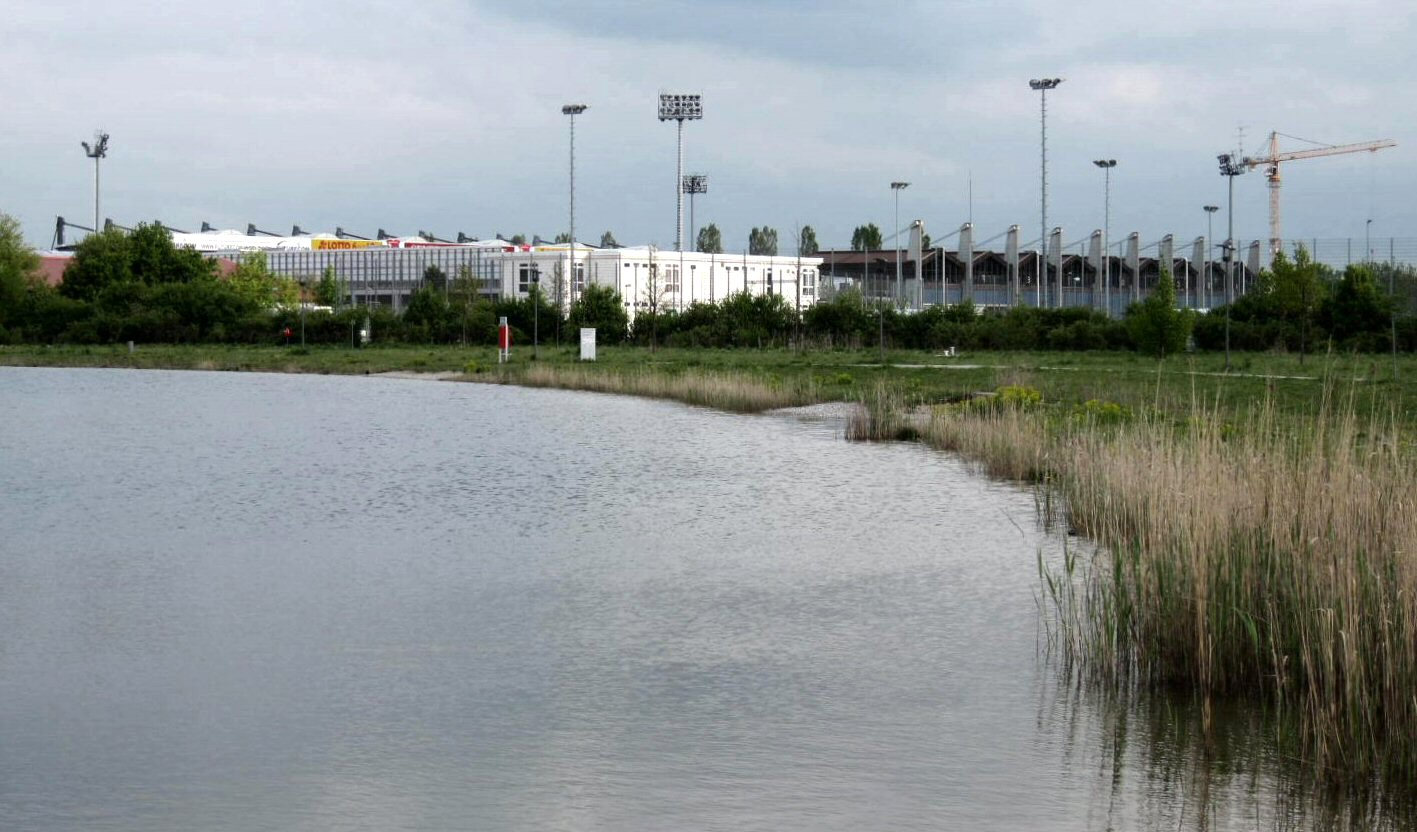 Unterhaching, Sportpark, Ansicht von Norden (Campeon-Park)